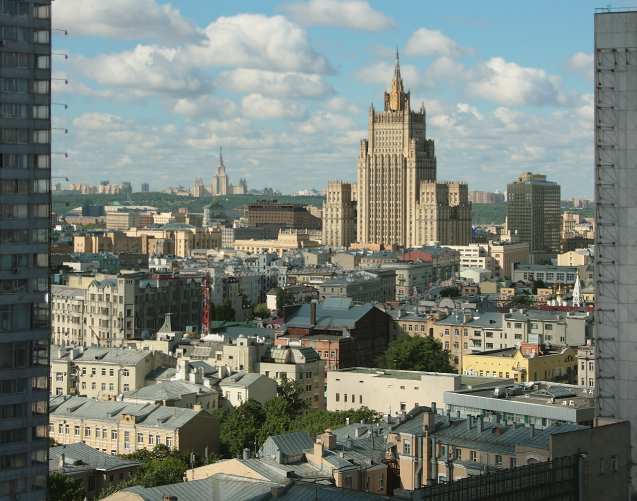 Москва, Новый Арбат, вид на здание МИДа и старый Арбат